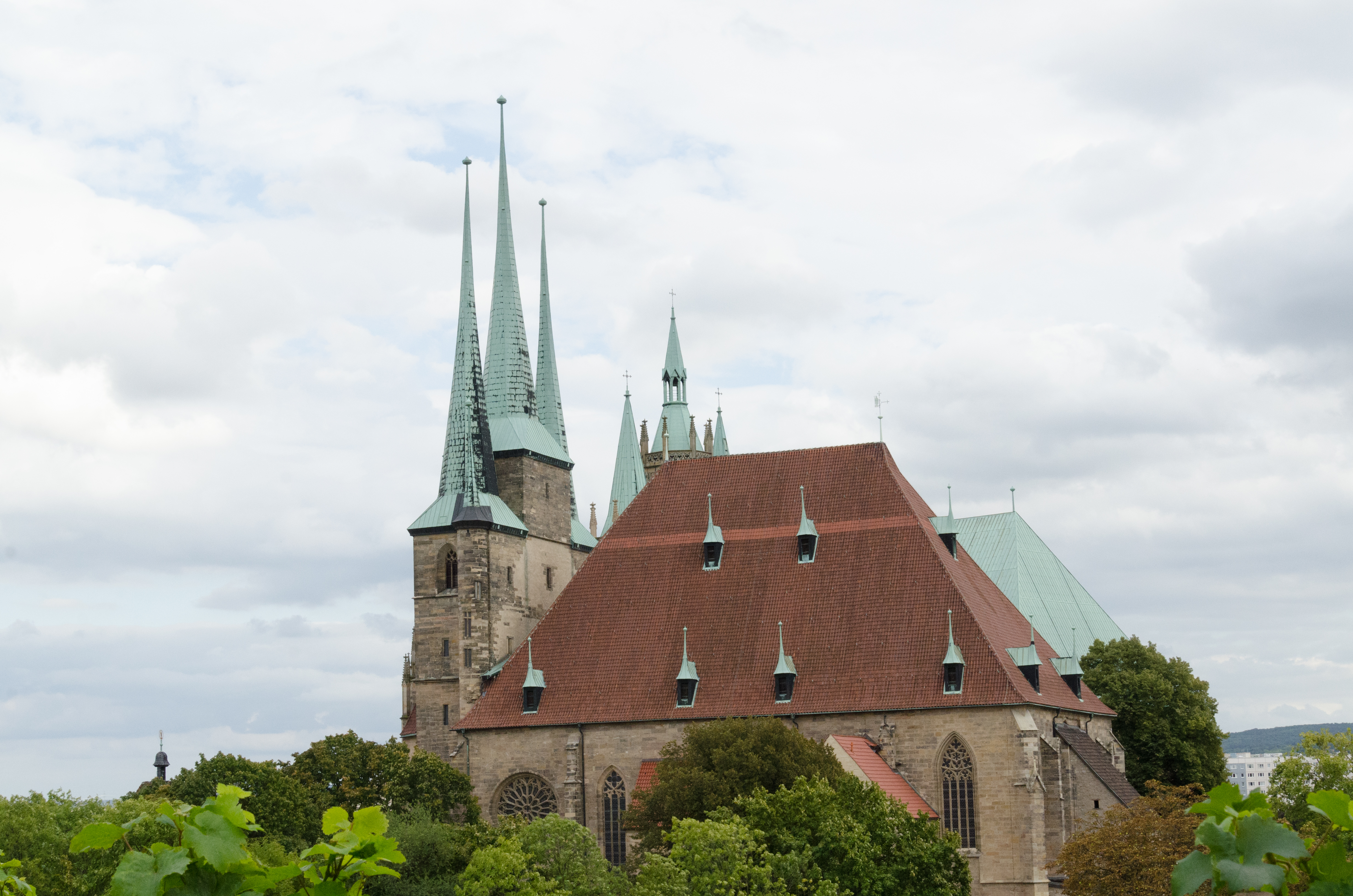 Erfurt, Severikirche vom Petersberg gesehen